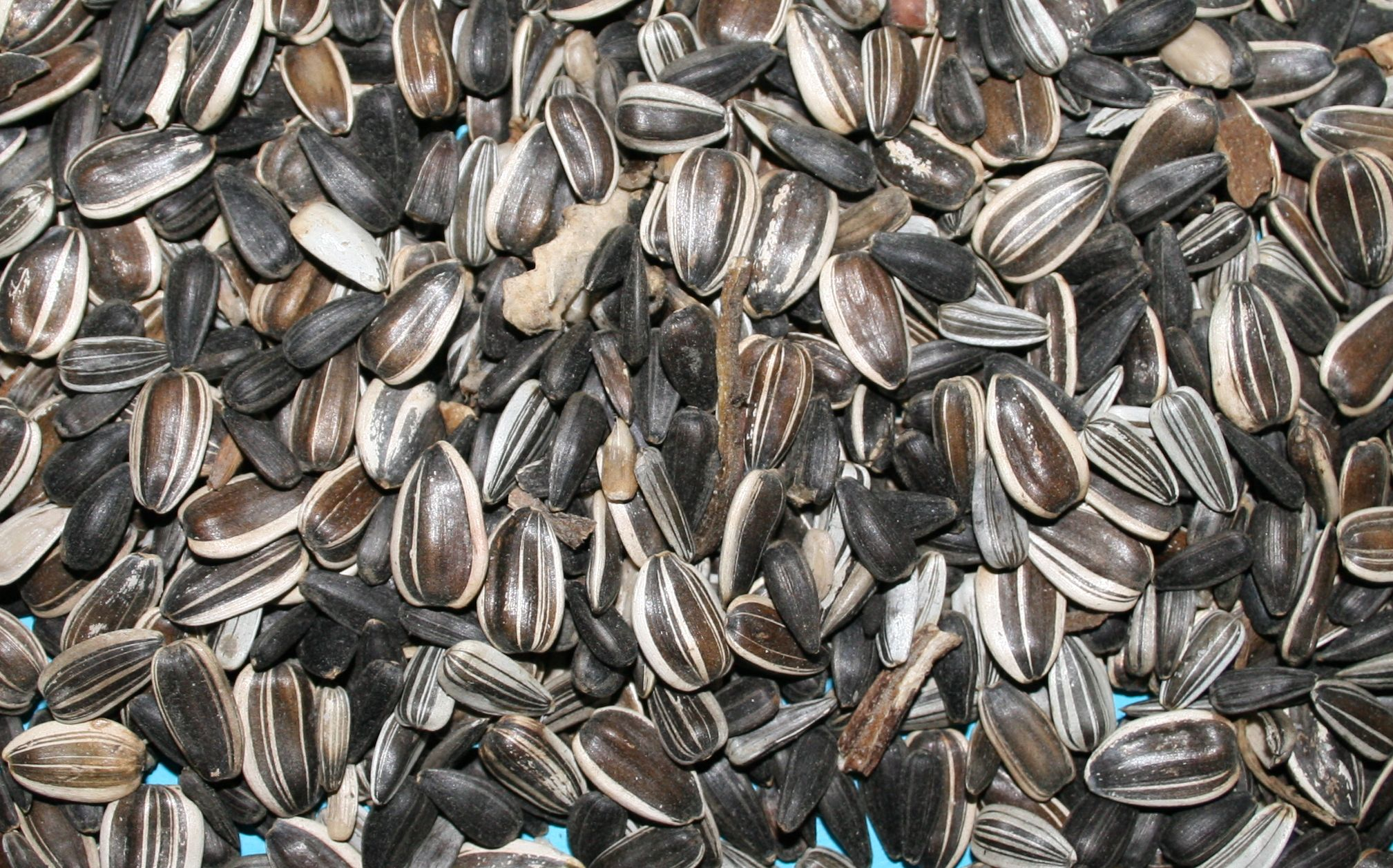 Sunflower seeds